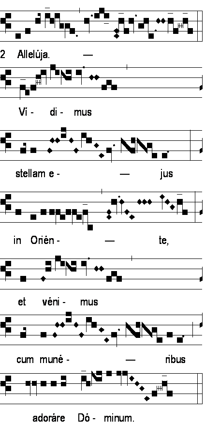 Alleluia "Vidimus stellam ejus" (Epiphanie), exemple du deuxième mode